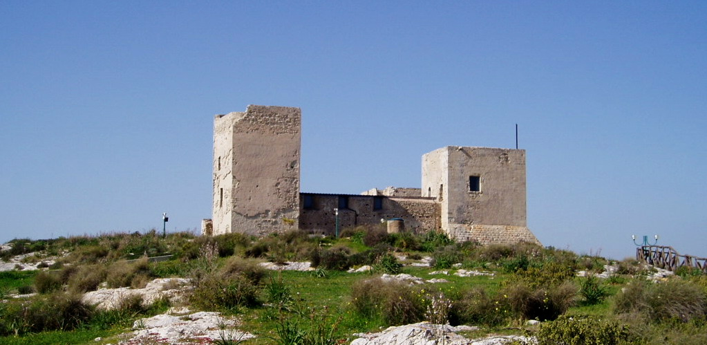 Castello di San Michele X sec d.c.